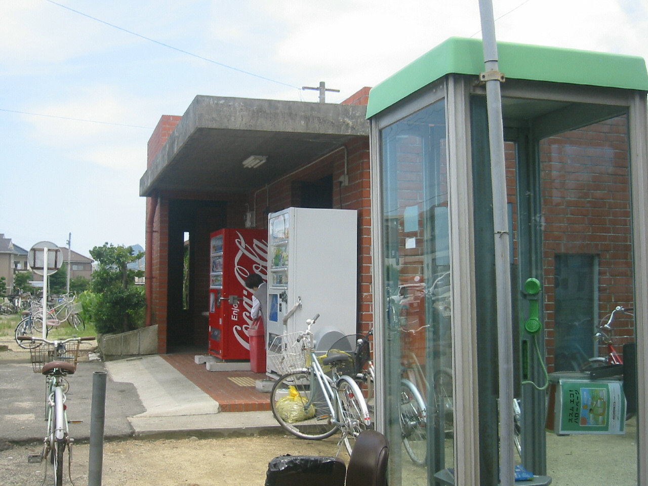 jr awai station